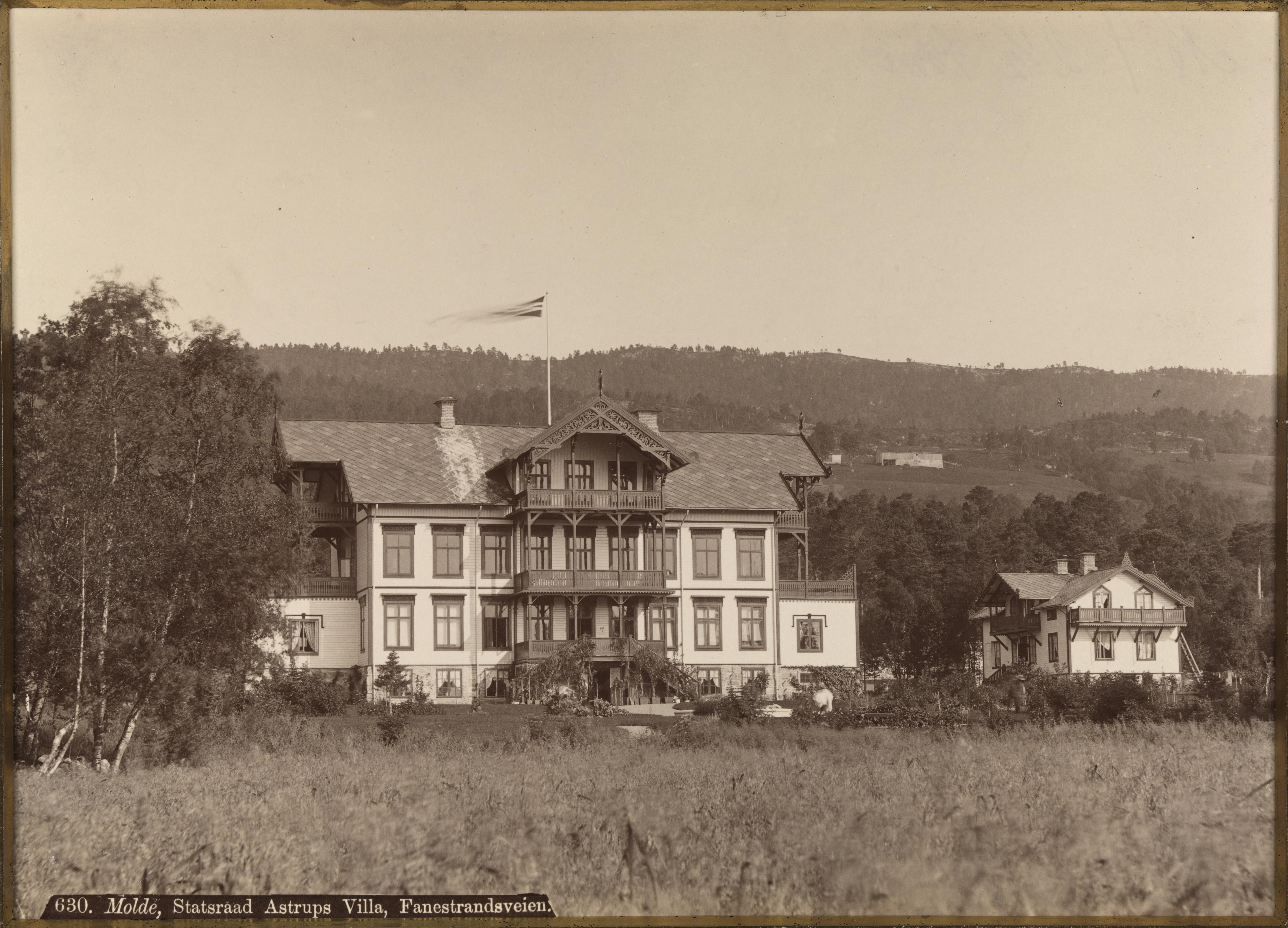 Bildet er hentet fra Nasjonalbibliotekets bildesamling Molde, Møre og Romsdal